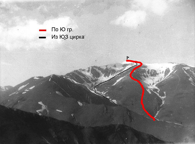 Bazardüzü -1